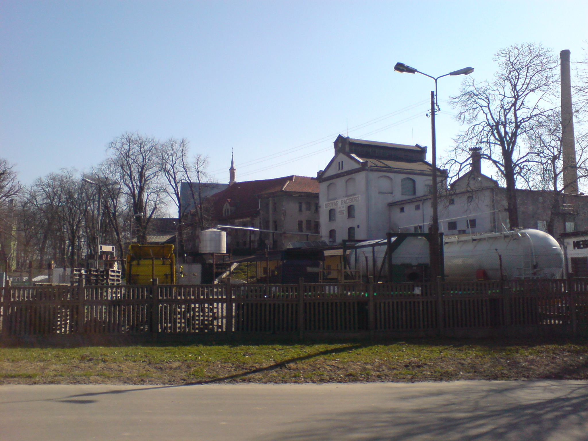 Browar Racibórz